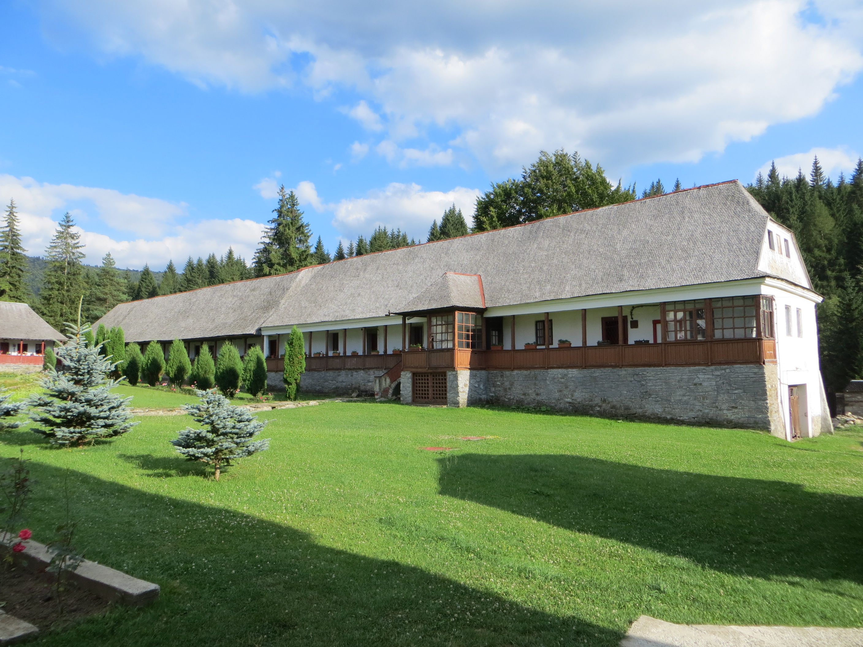 Trapeză 04